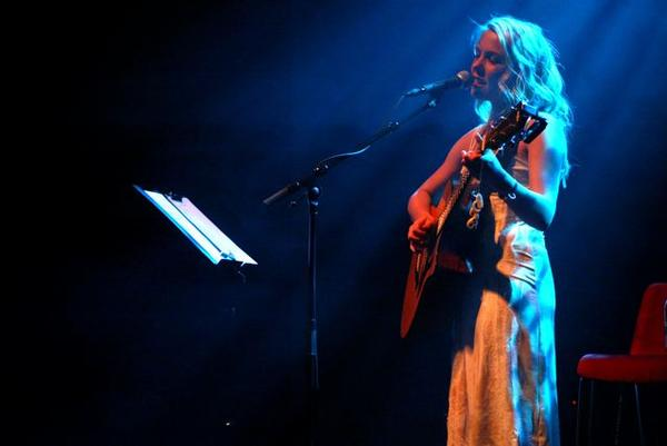 Hera [1]